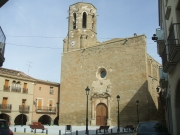 Església de Santa Maria de Linyola - obra de Bartomeu Roig - i plaça porxada.